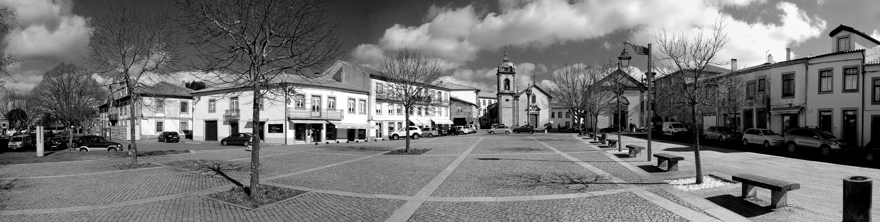 Largo D. Dinis